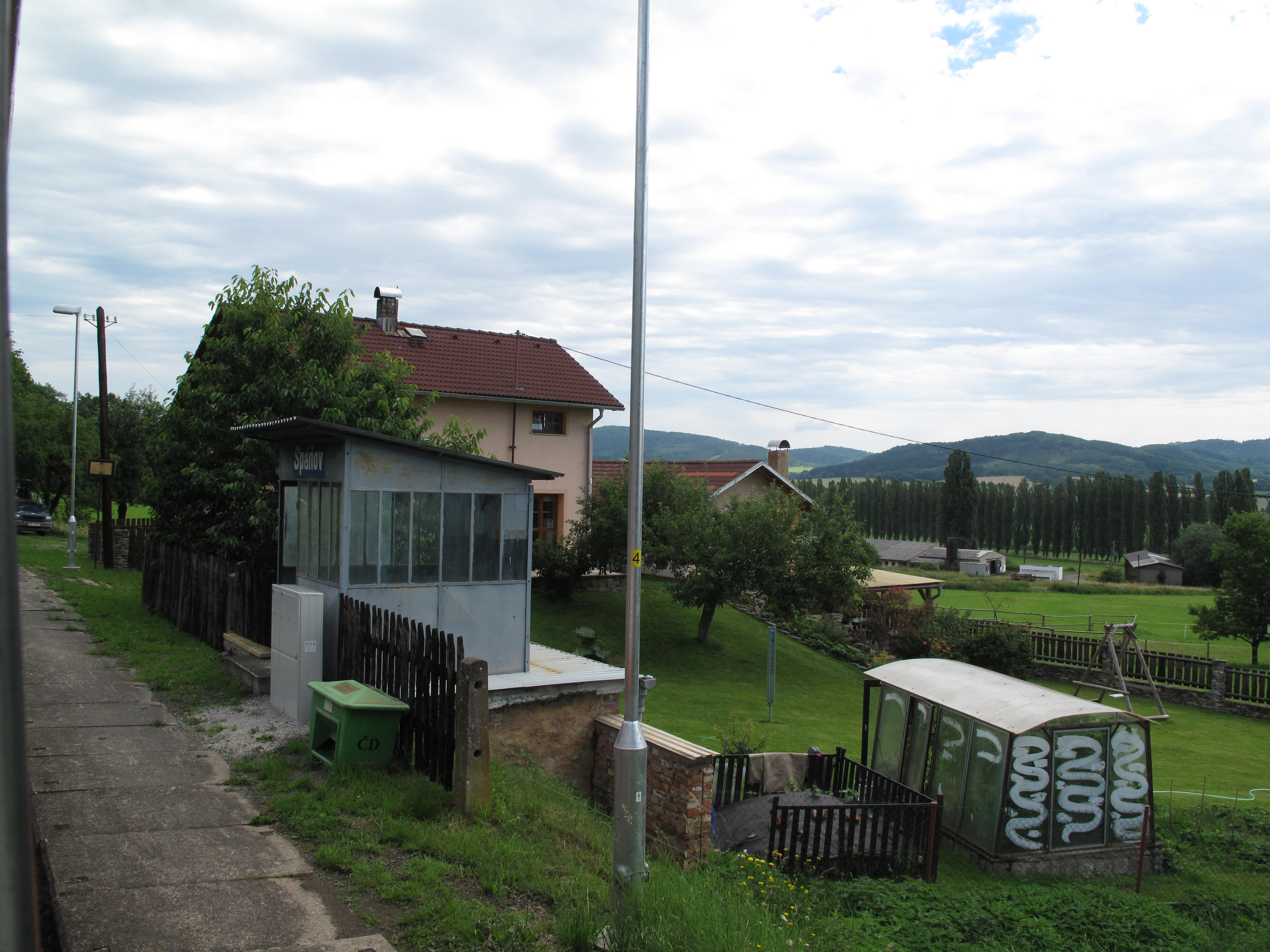 Spáňov, železniční stanice